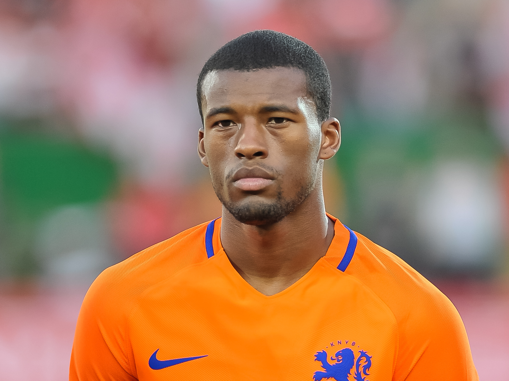 Wien, 4.6.2016, ÖFB Laenderspiel - Österreich vs Niederlande. Bild zeigt Georginio Wijnaldum (NED).